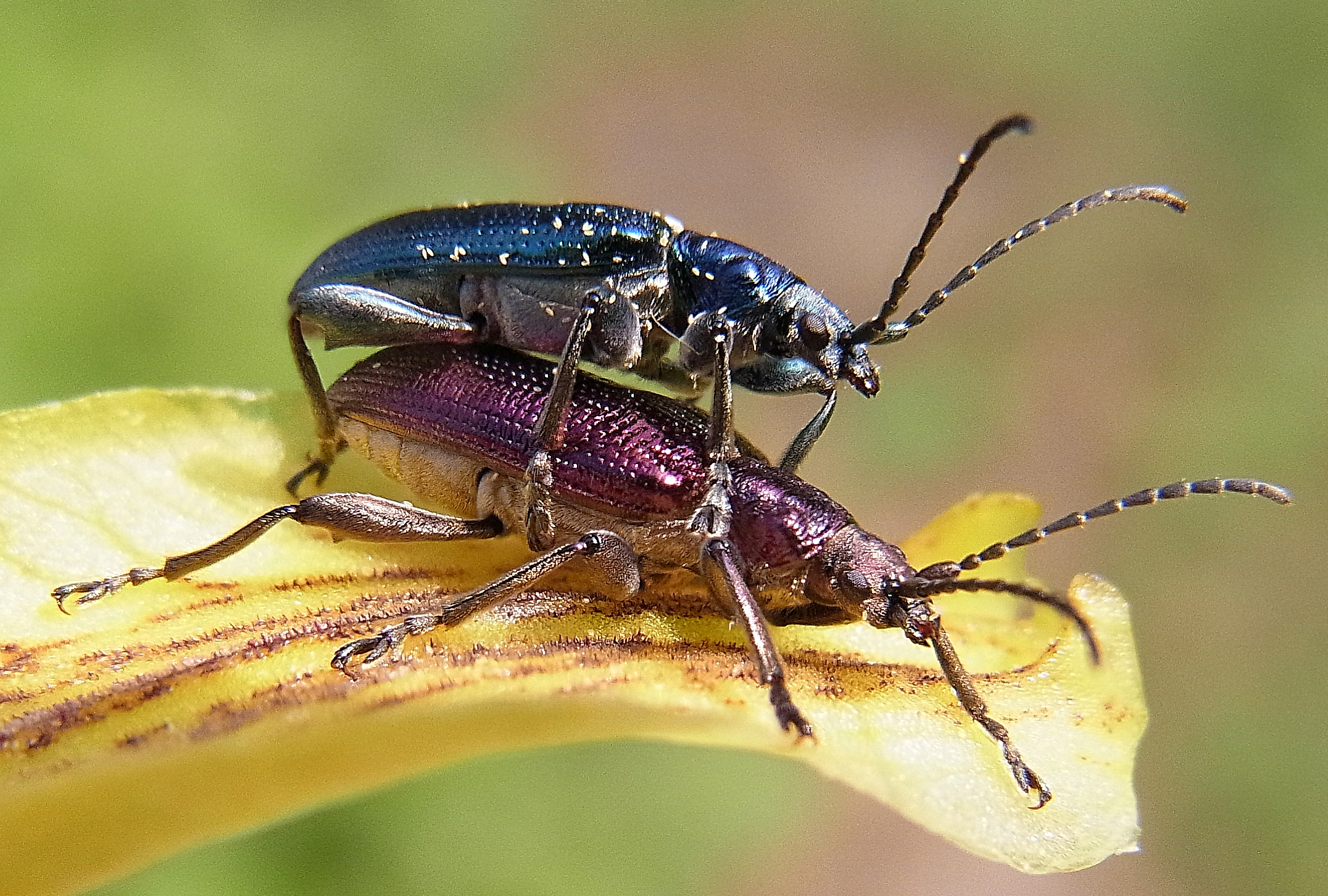 Plateumaris sericea aus Nordwestungarn, Totarm der Donau bei Lipót